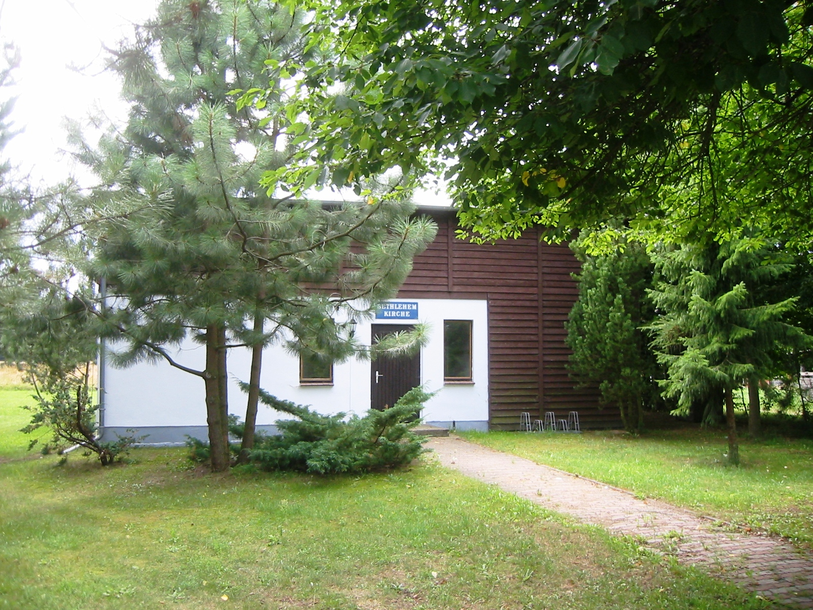 Ansicht der Bethlehemkirche in Spandowerhagen, ein Ortsteil der Gemeinde Kröslin im Landkreis Vorpommern-Greifswald (Mecklenburg-Vorpommern).